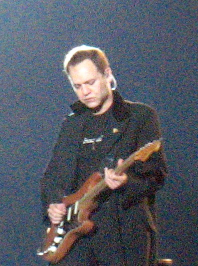 El guitarrista Juan Valdivia, de Héroes del Silencio, durante la gira de 2007